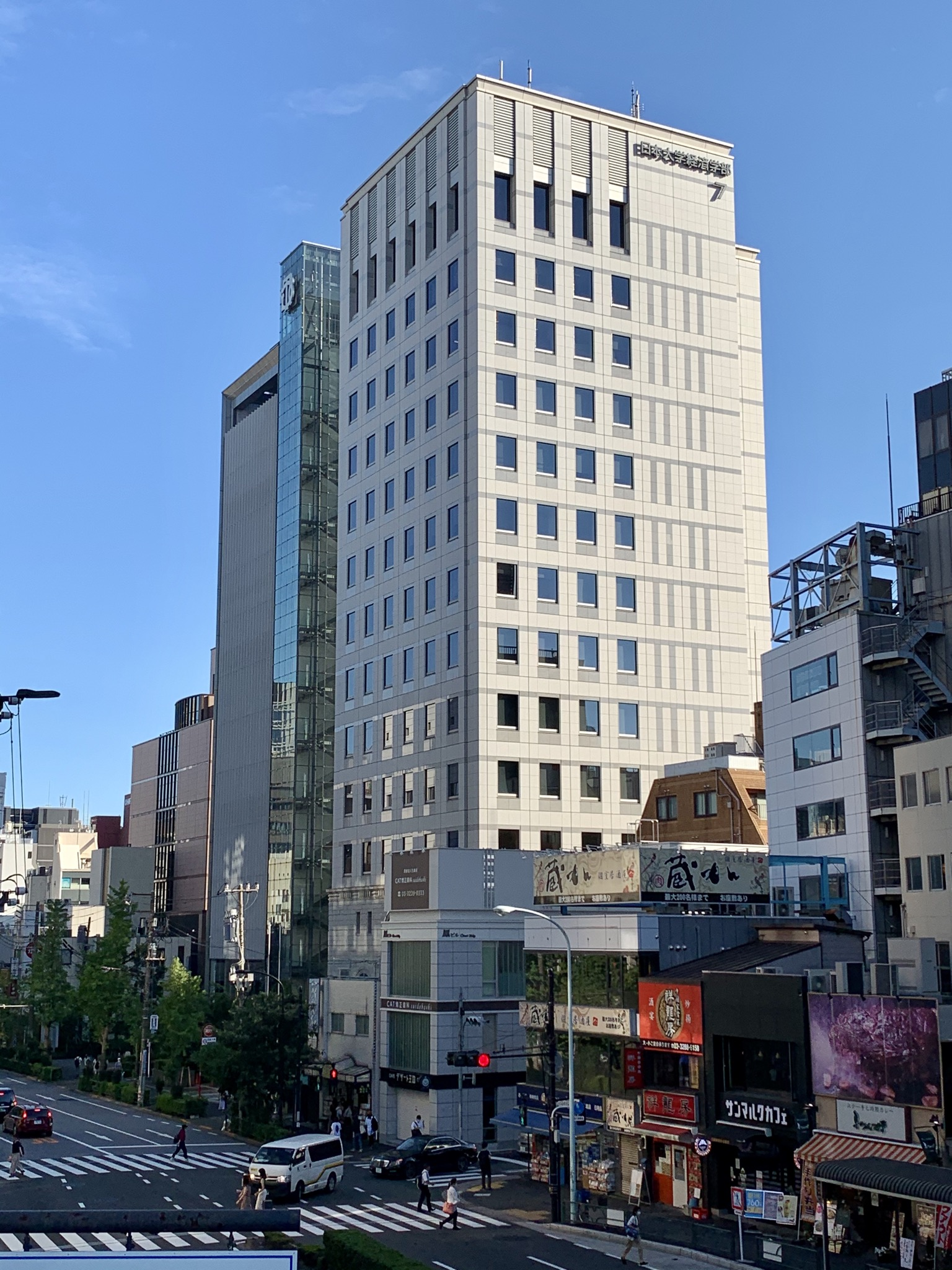 東京都千代田区神田三崎町2丁目8-14に所在する日本大学経済学部7号館